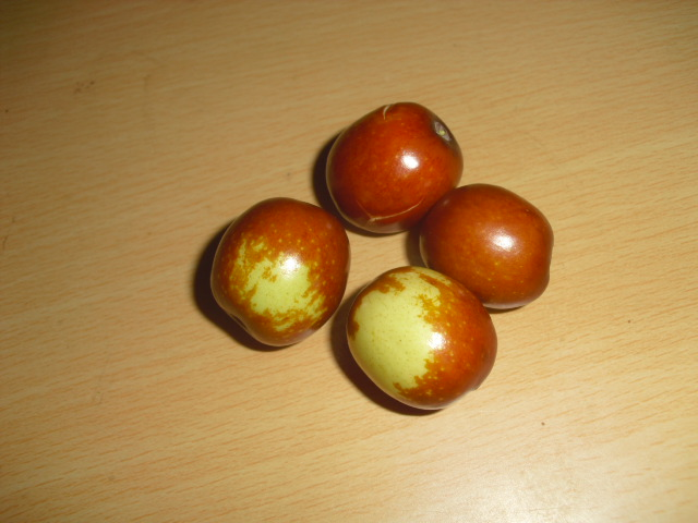 jujubier